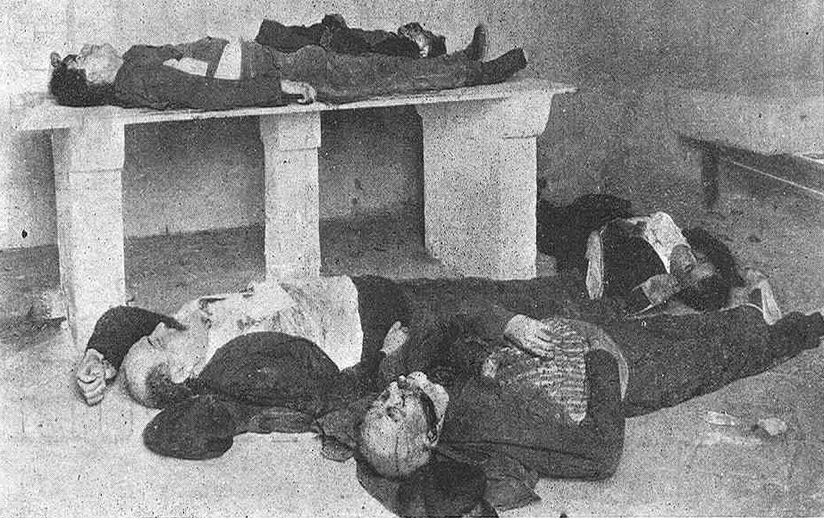 Els morts a l'enfrontament de Sant Feliu entre carlins i lerrouxistes l'any 1911